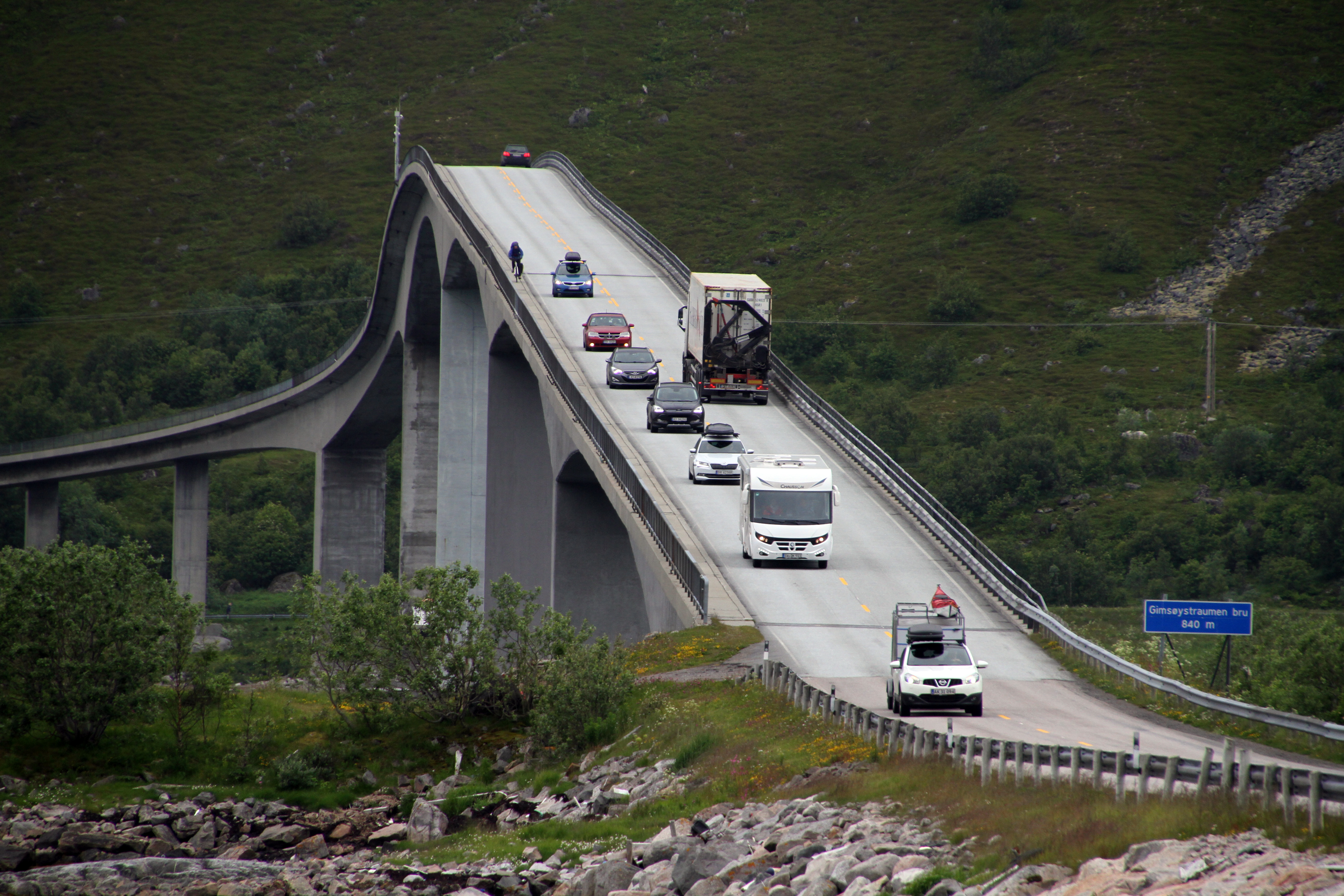 Gimsøystraumen-Bruecke zwischen Austvågøy und Gimsøy (Lofoten, Norwegen)